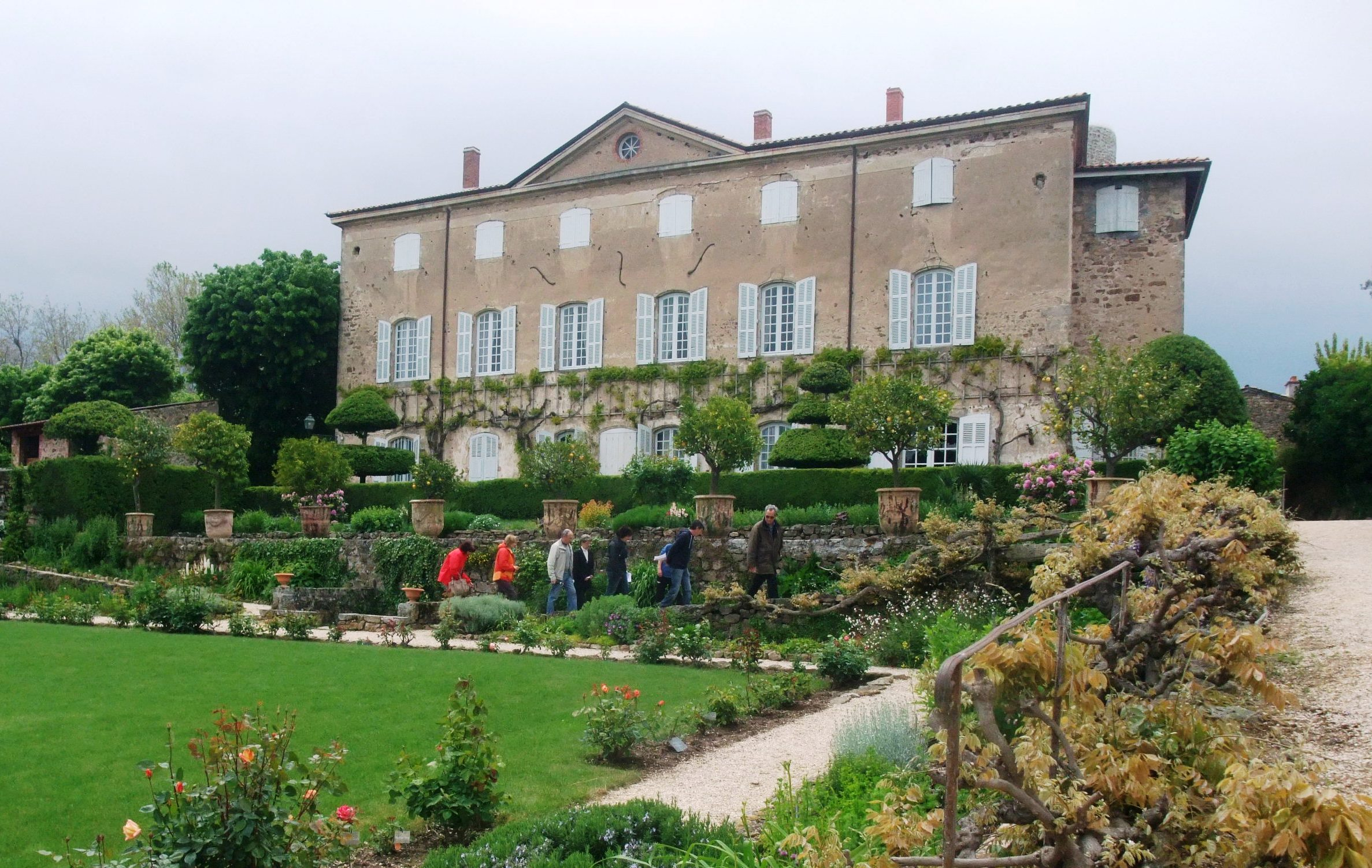 Brogieux château et jardin